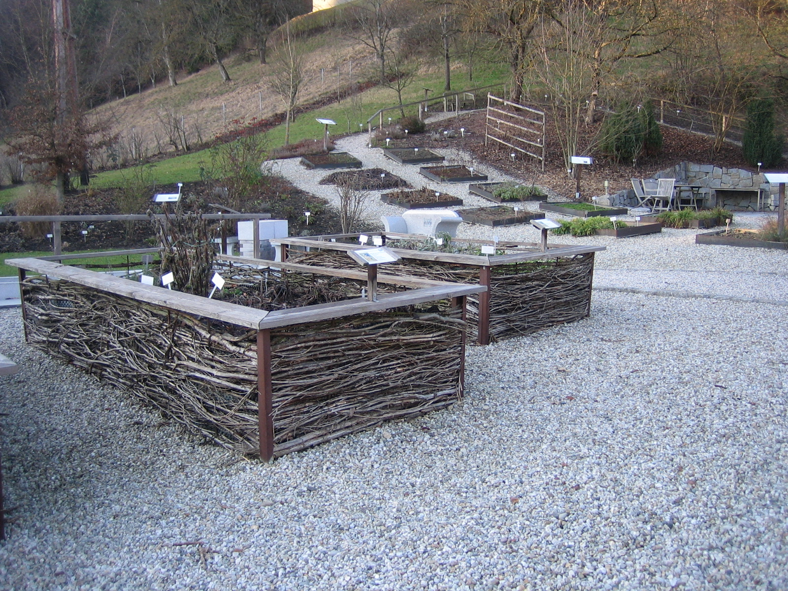 Blick auf die Beete & Hochbeete im Kräutergarten Bad Mühllacken